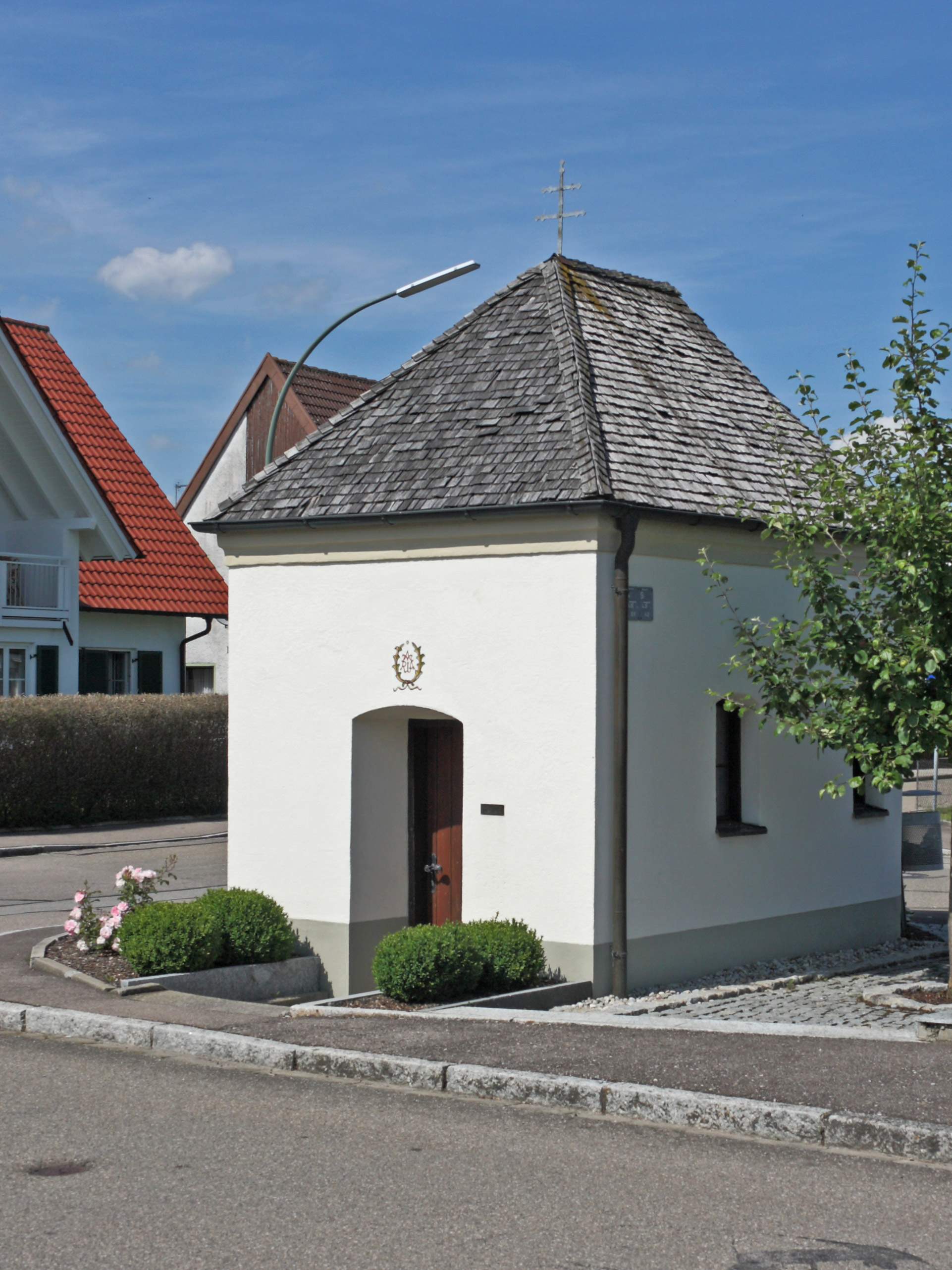 Ansicht von Südwesten